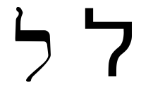 hebrew letter lamed